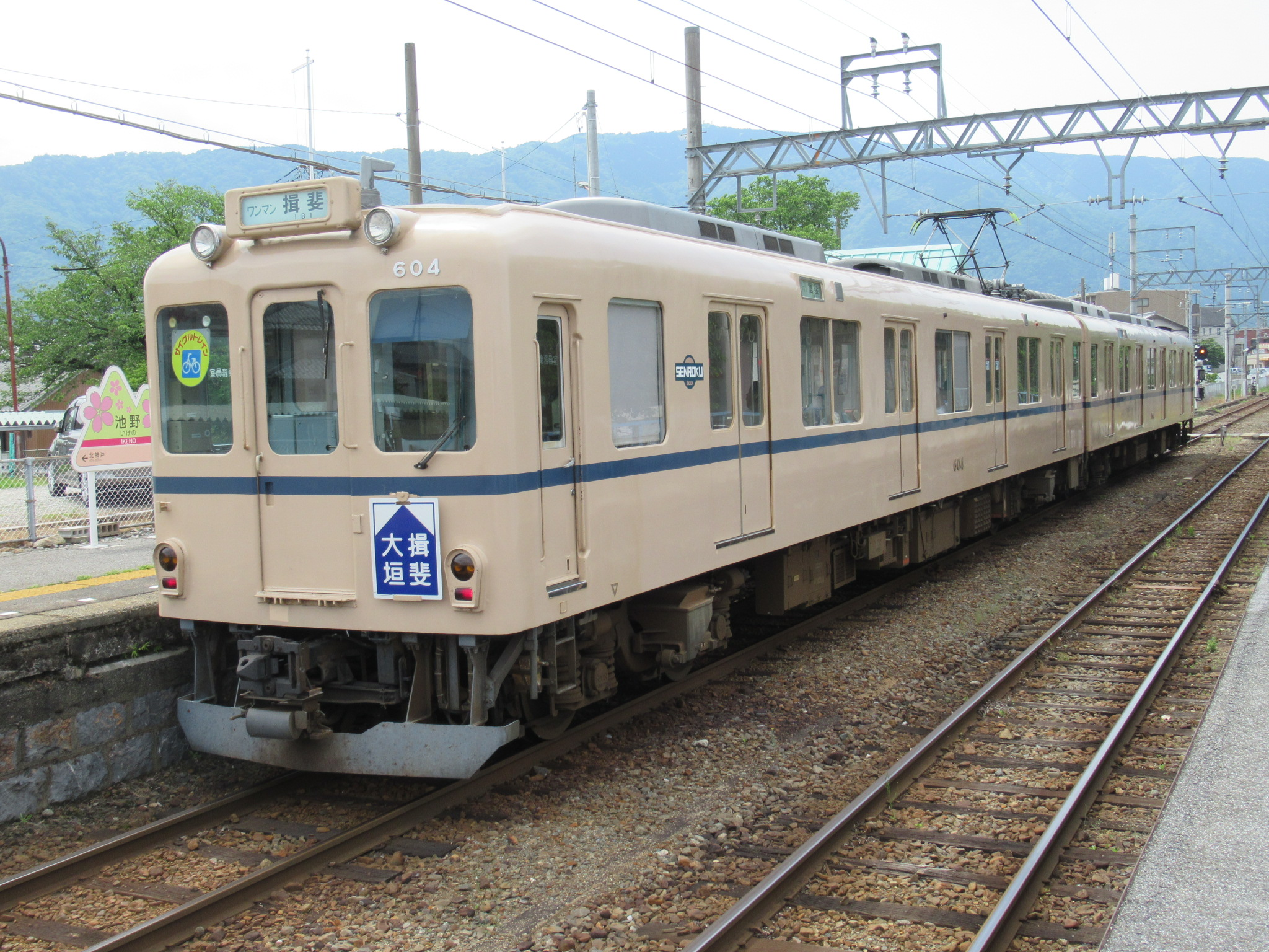 養老鉄道604 池野駅